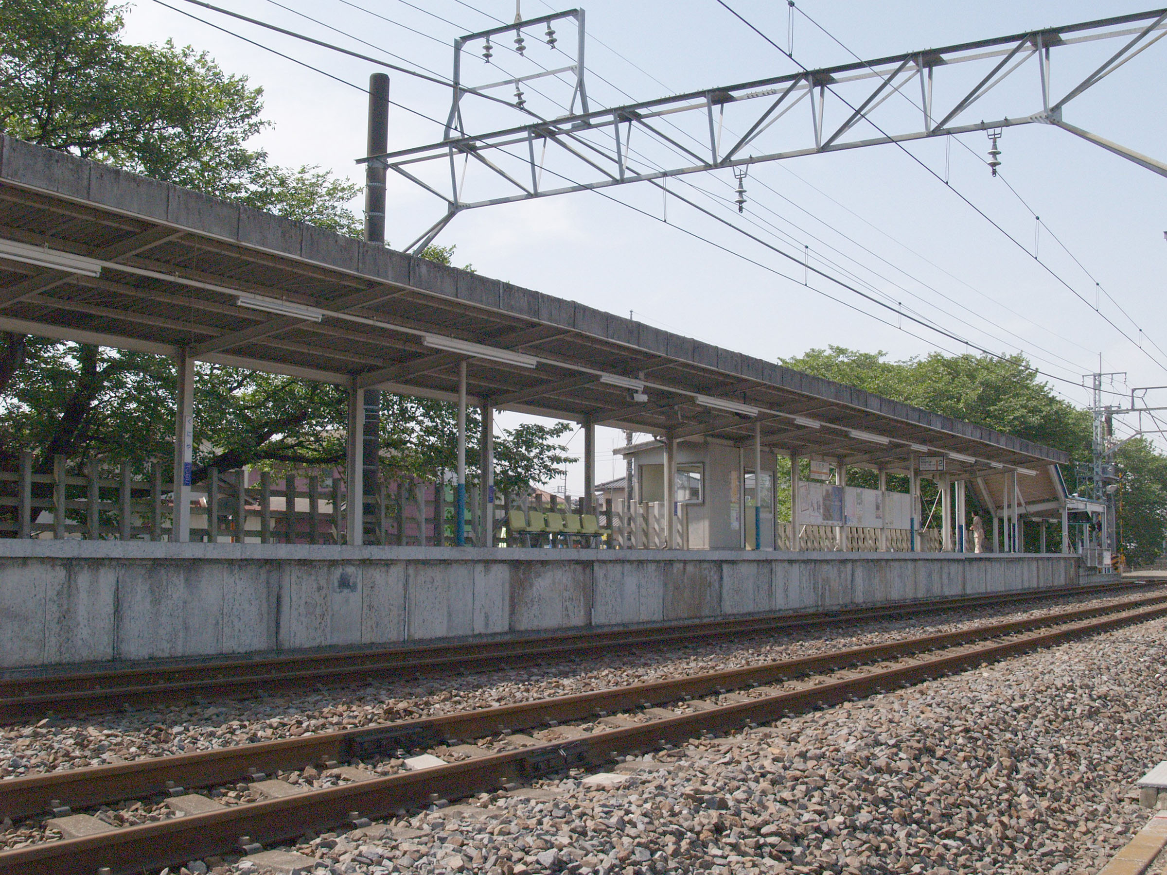 国谷駅ホーム